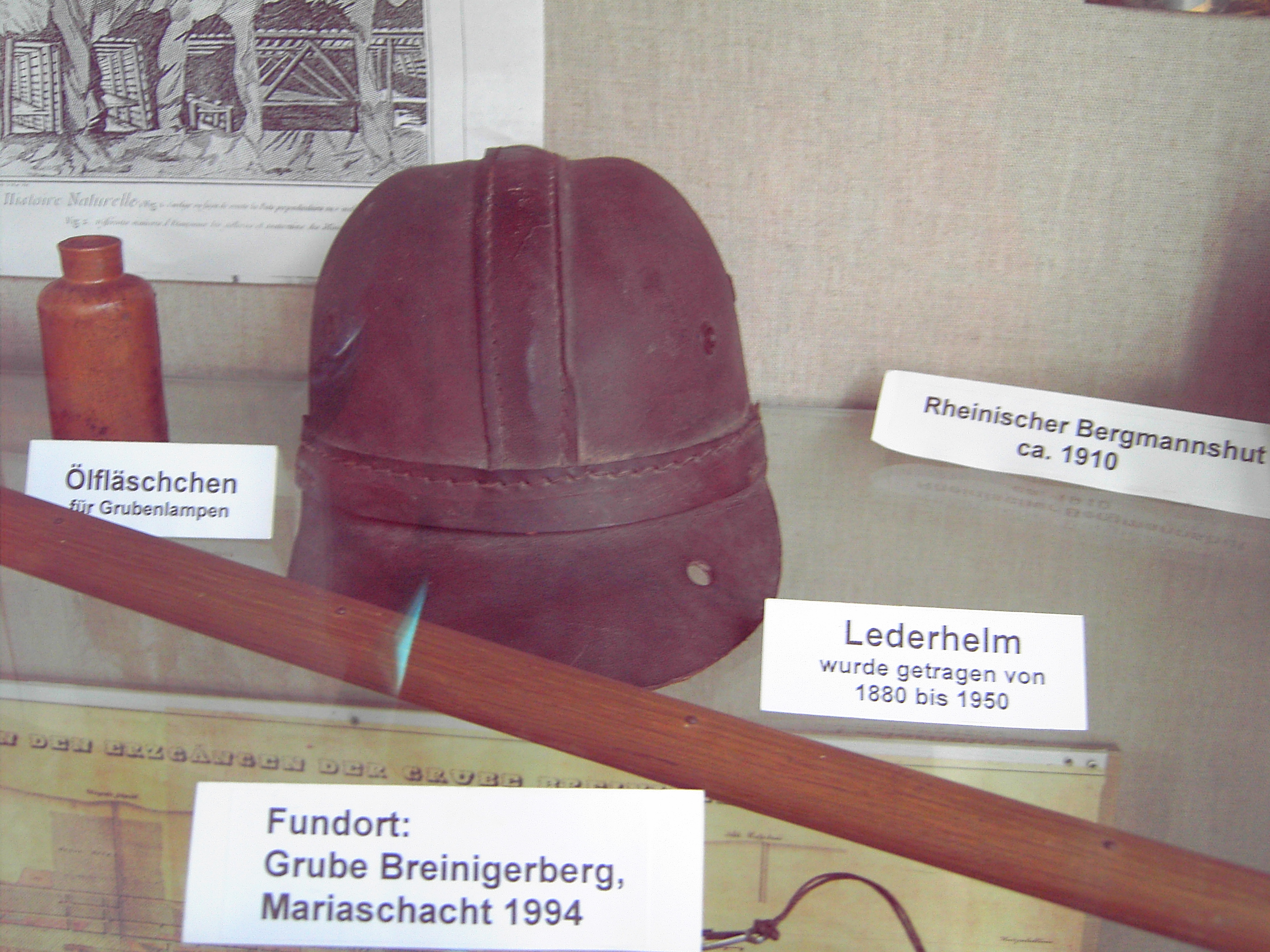 Lederhelm als Ausstellungstück des Informationscentrums Schlangeberg